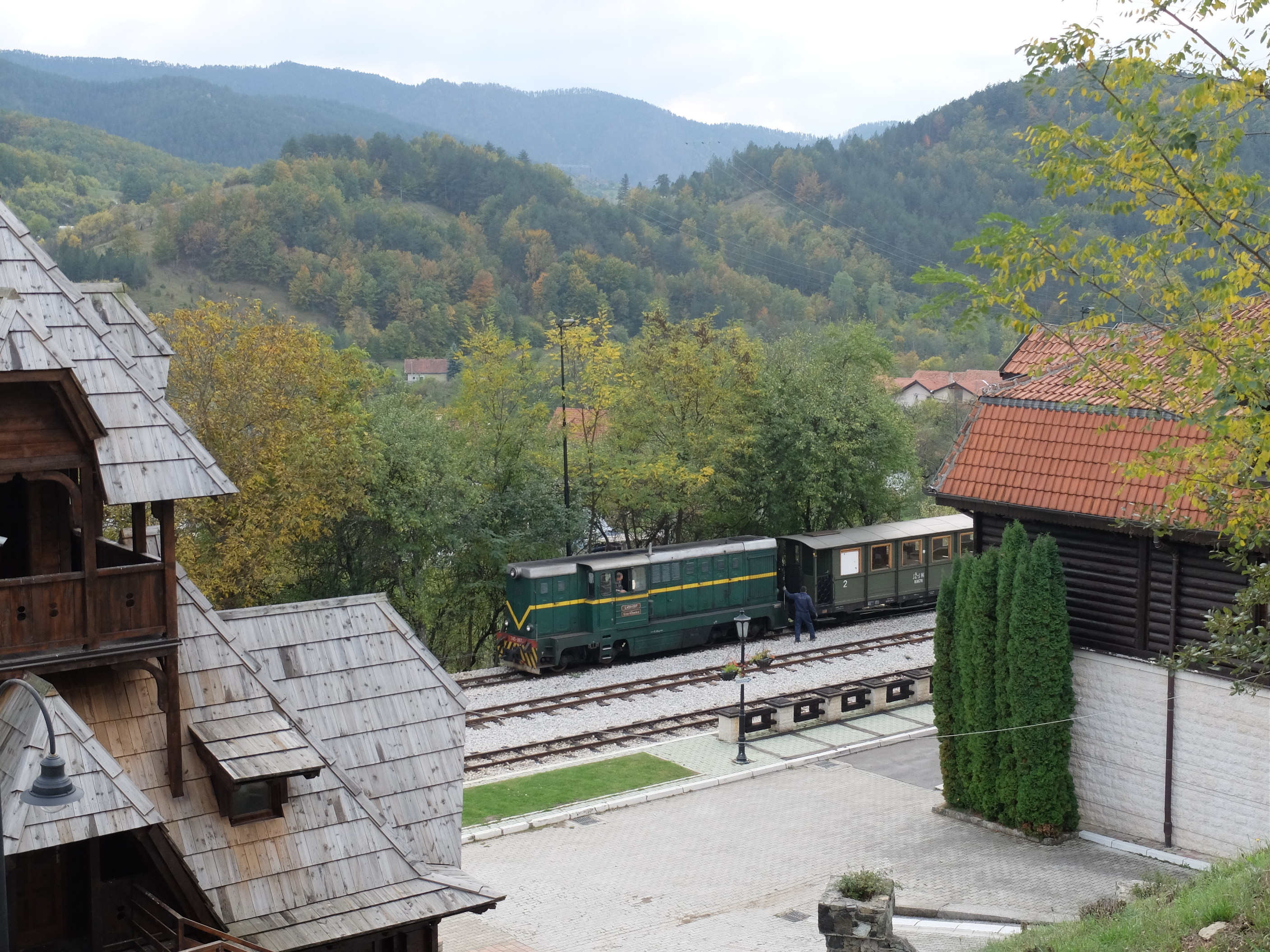 L45H-097 der Museumsbahn Šarganska osmica in Mokra Gora